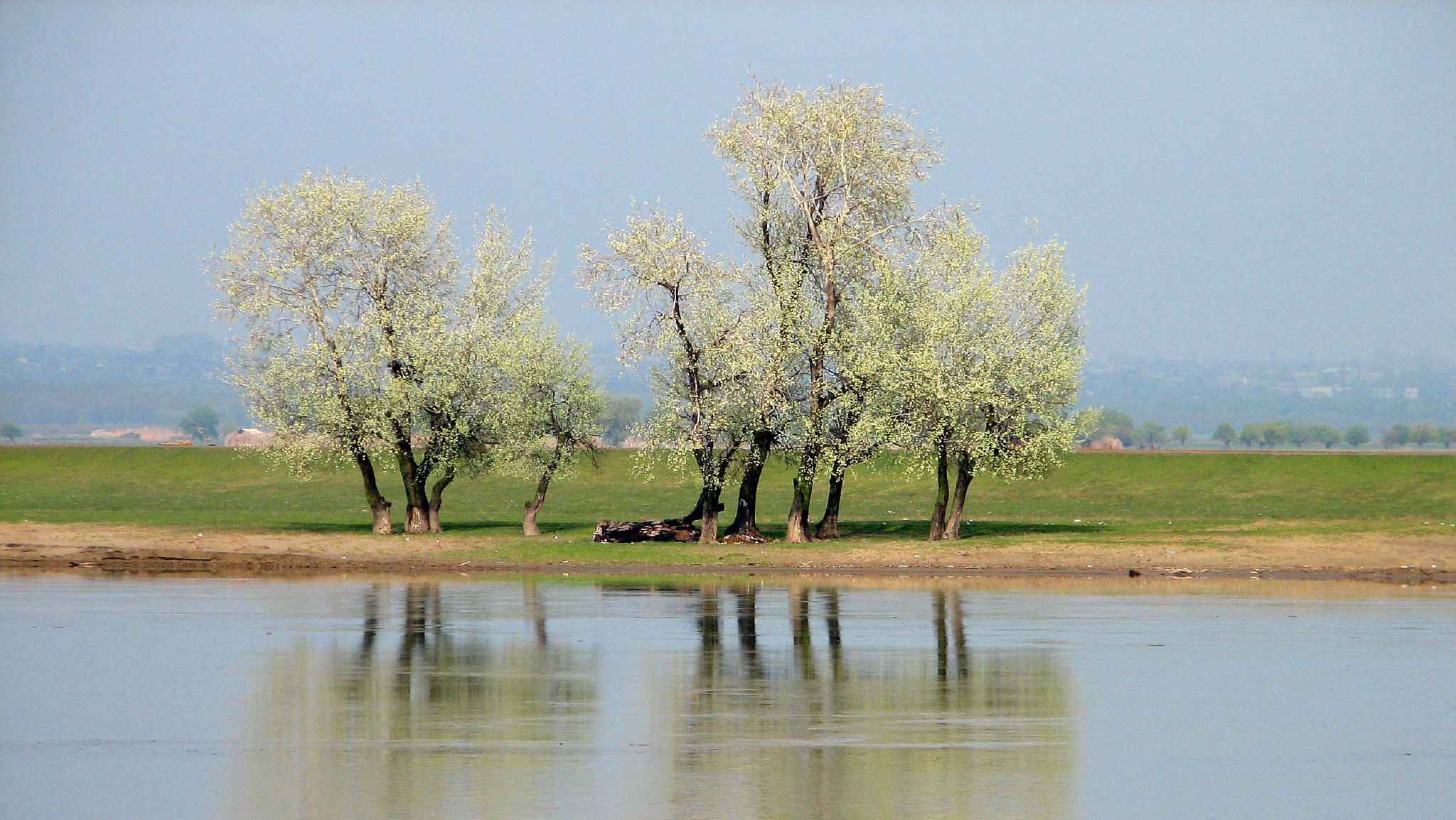 Danube, near Oltenita 01